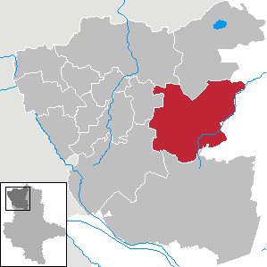 Lage von Kalbe im Altmarkkreis Salzwedel